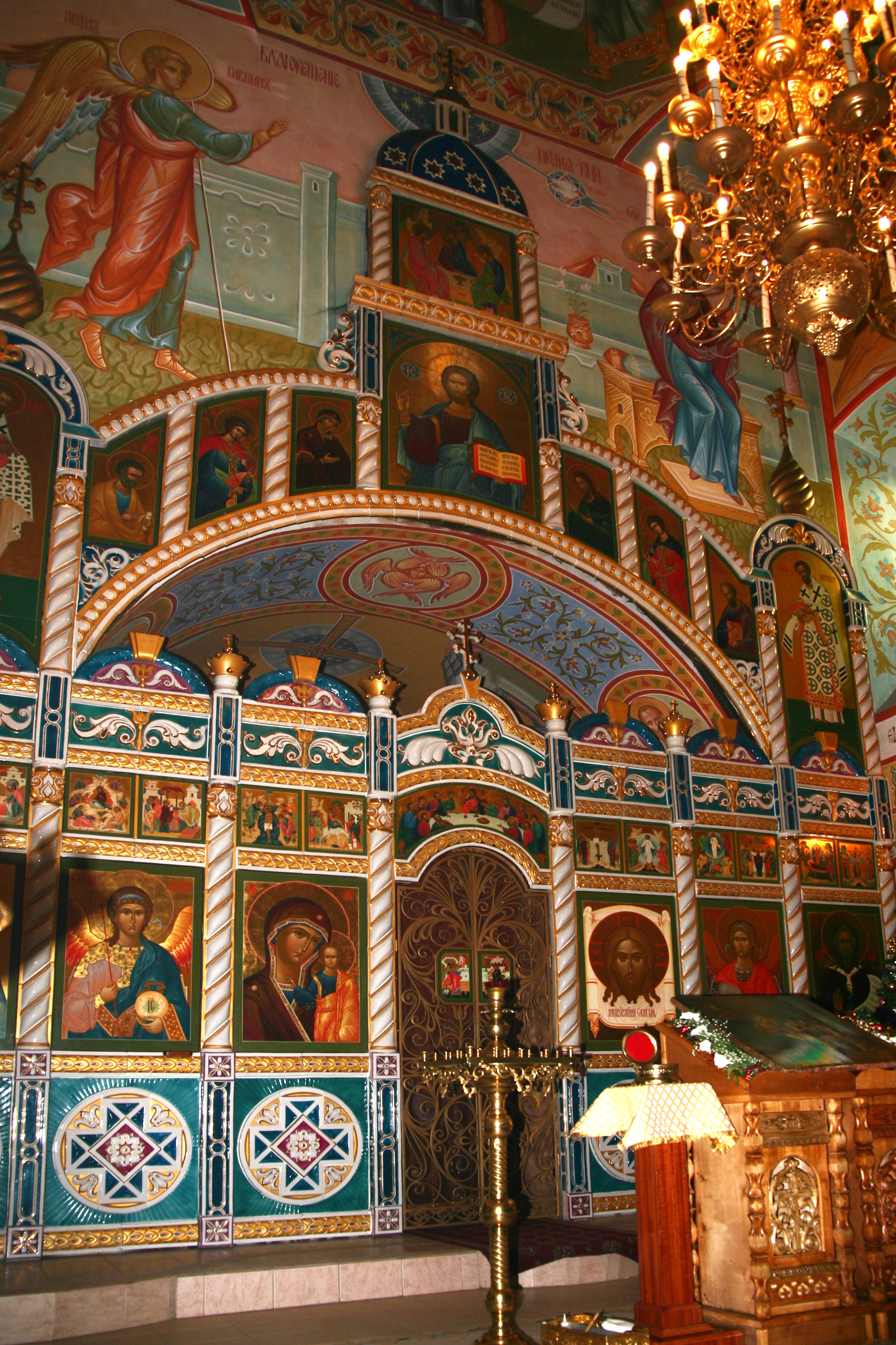 Фарфоровый иконостас в храме Илии Пророка в с.Ильинском Красногорского района Московской области